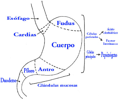 De wikipedia inglesa, modificada al castellano.